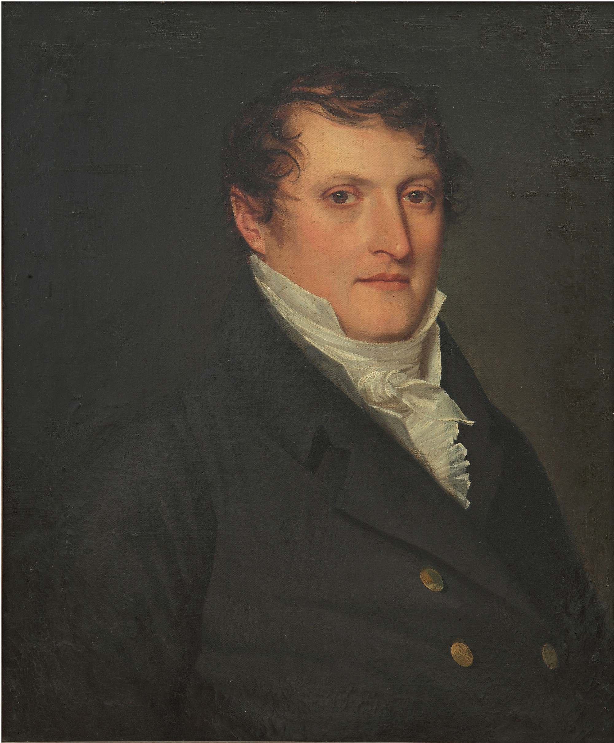 Retrato del Gral. Manuel Belgrano.